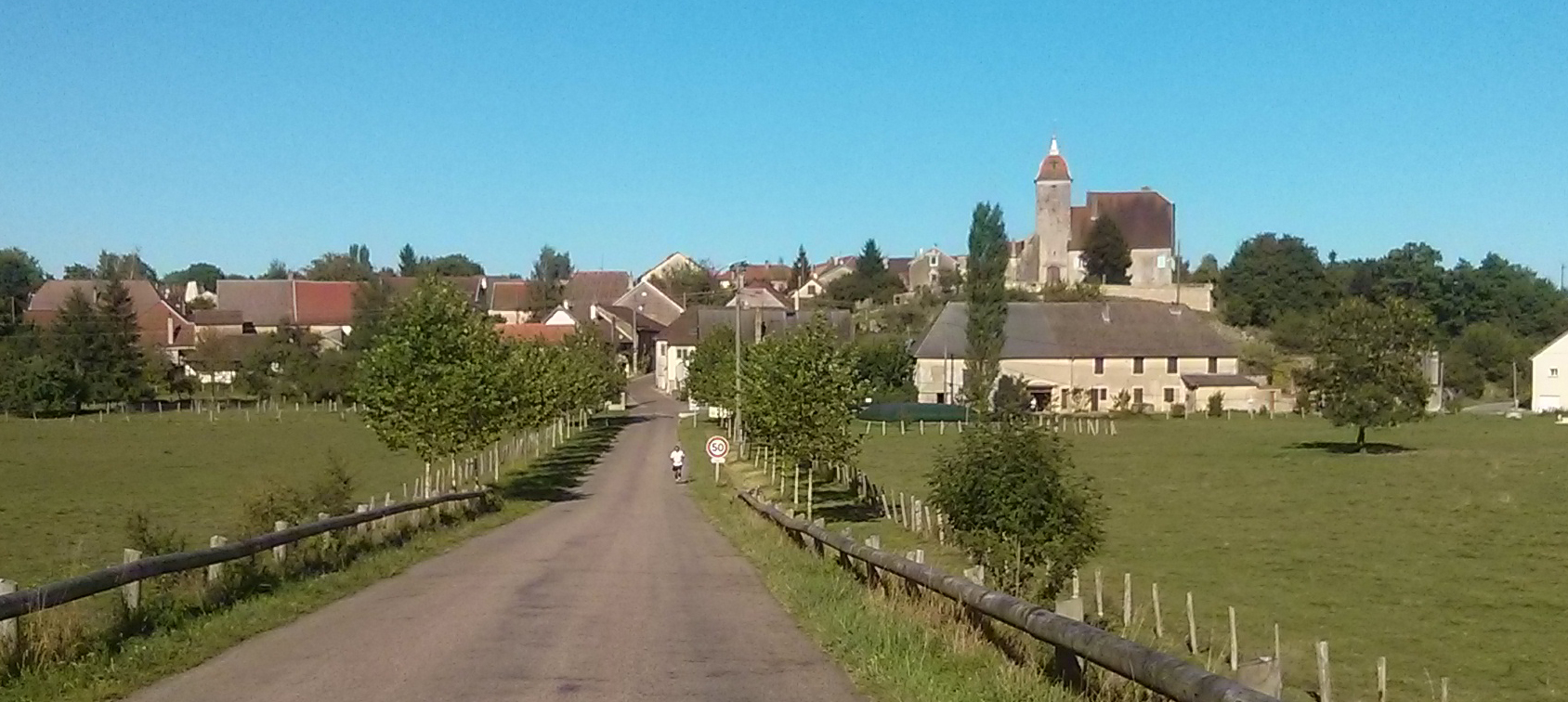 Vue de la commune de Bussières (Haute-Saône) depuis le pont sur l'Ognon